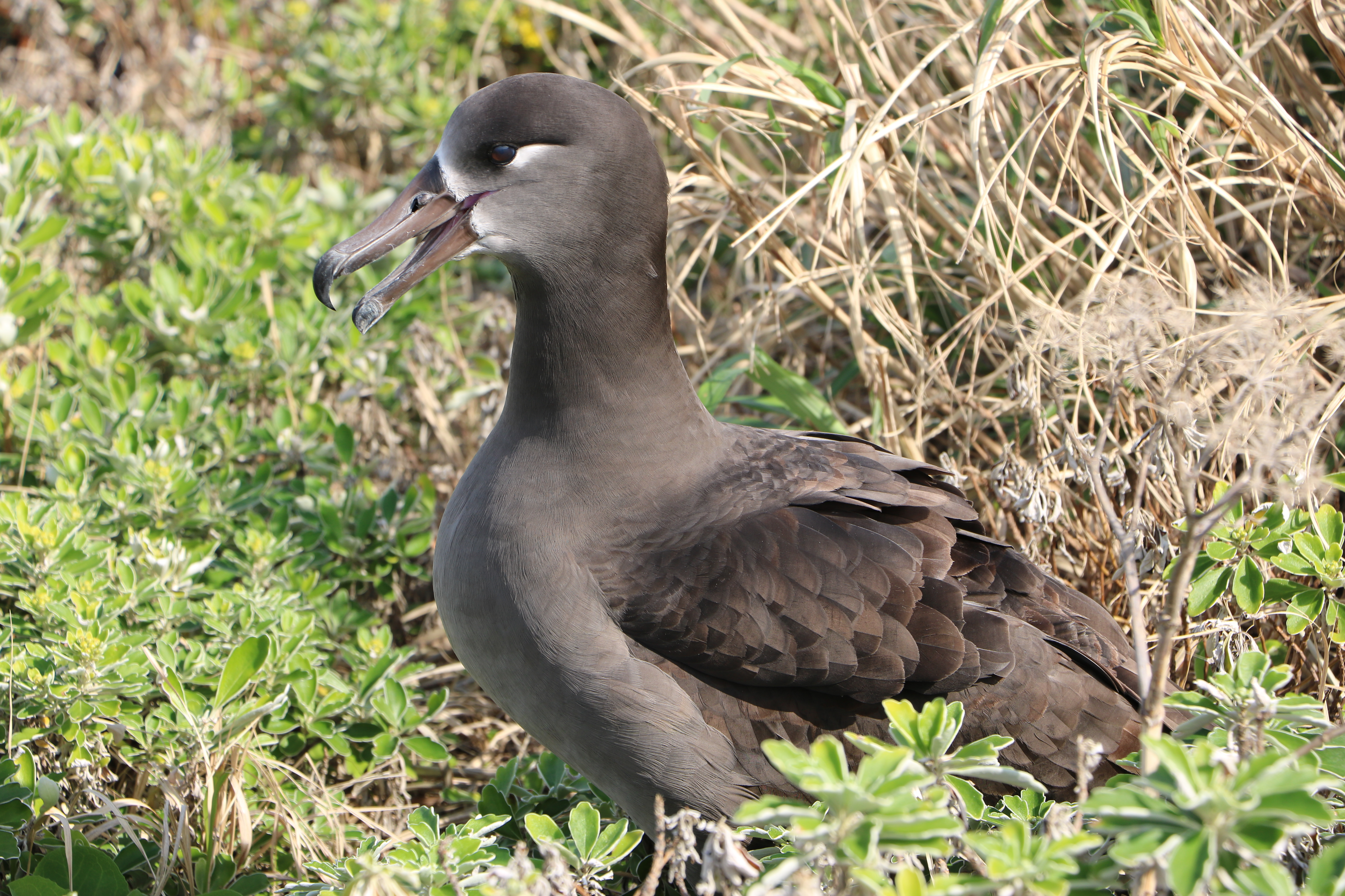 八丈小島のクロアシアホウドリと生息地